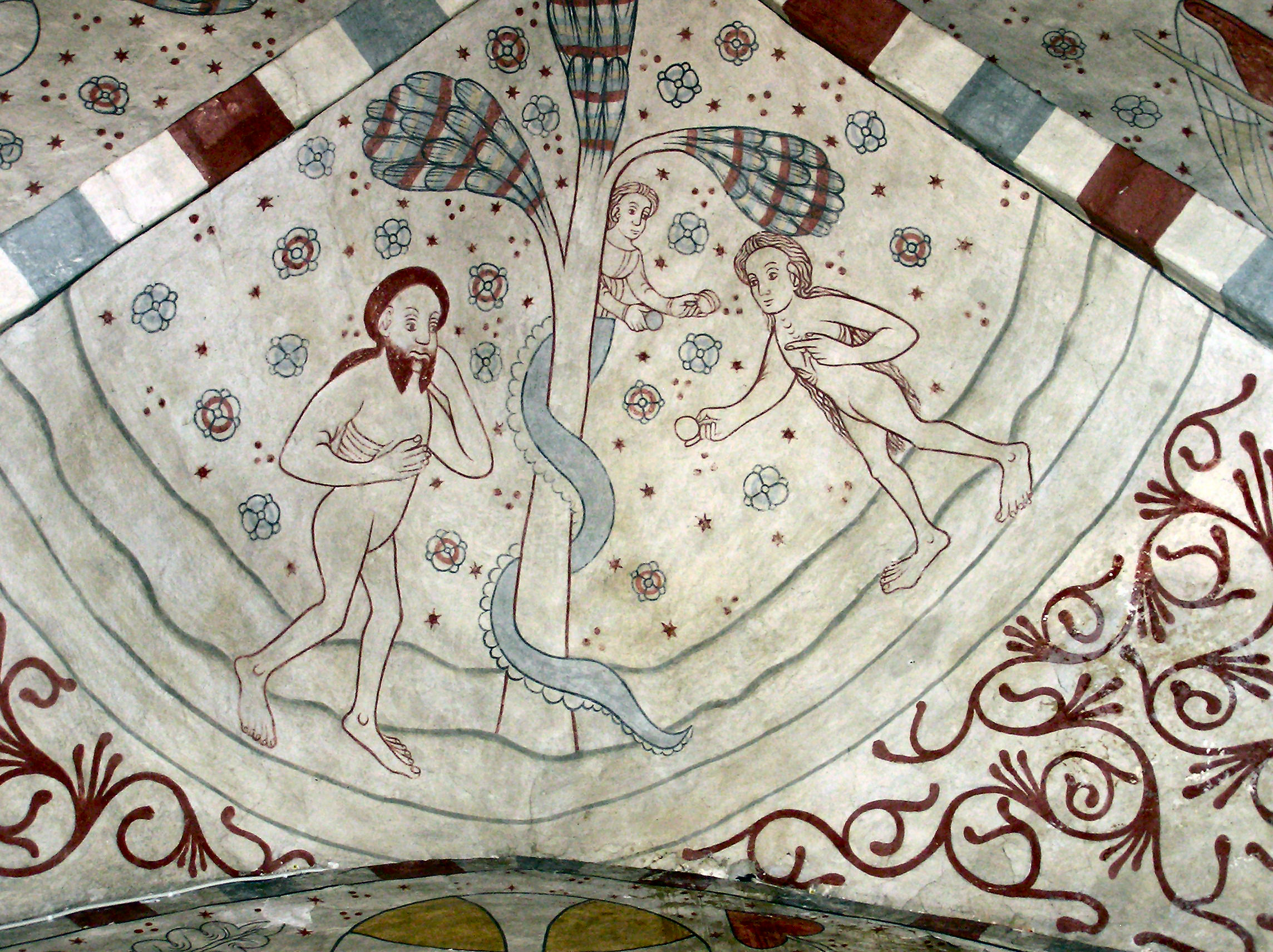 Vittskövle Kirke, Skåne, Syndefaldet (1. Mos. 3,6-24)